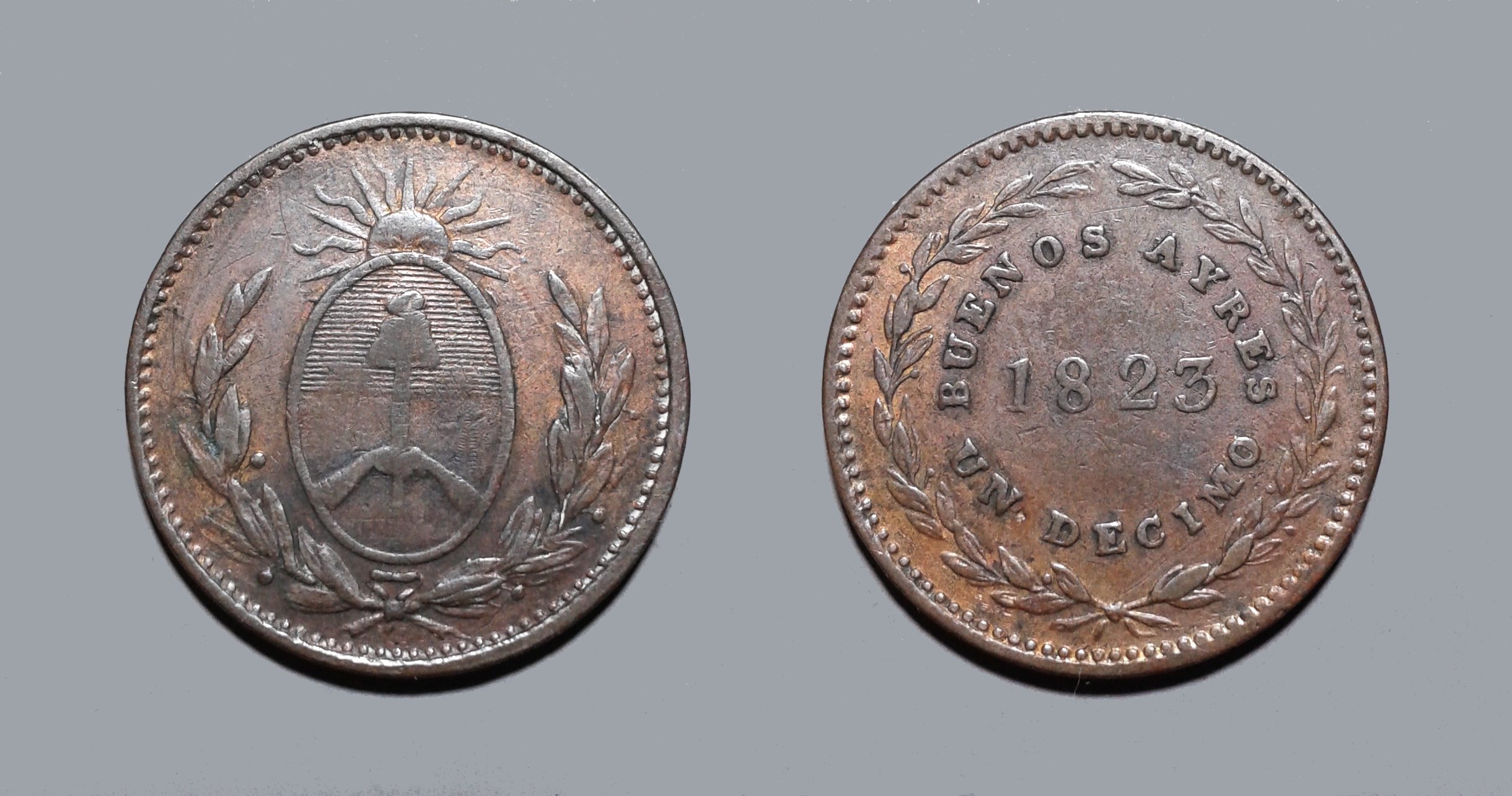 Moneda de 1 décimo de real de 1823, emitida por la Casa de la moneda de la provincia de Buenos Aires. Escudo nacional argentino en el anverso. Catalogada en el Standard Catalog of World Coins como km1 (Argentina-Buenos Aires).